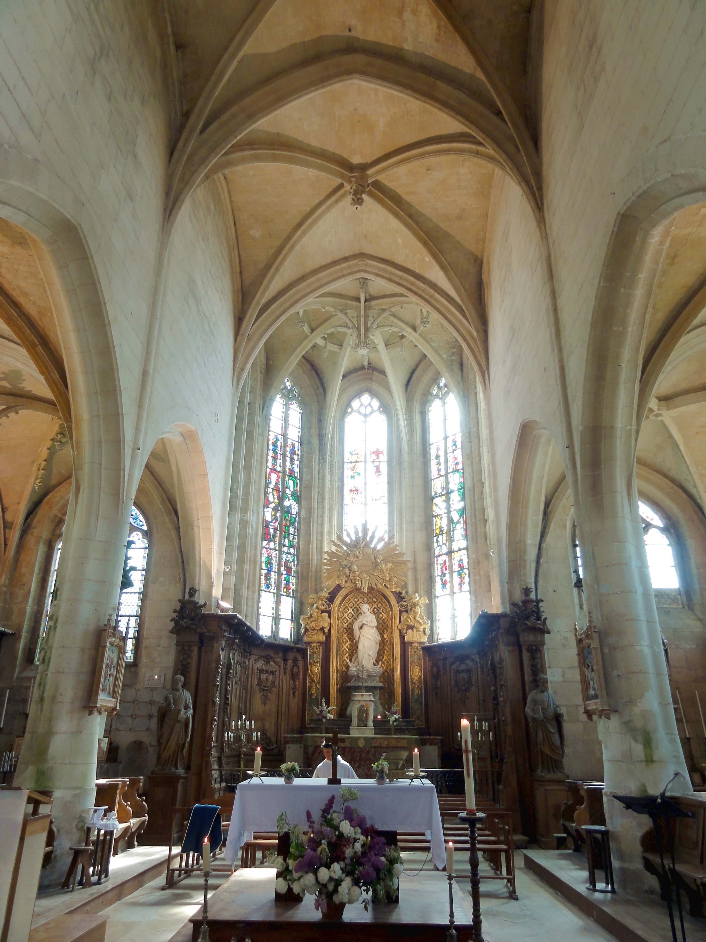 Intérieur de l'église (voir titre).